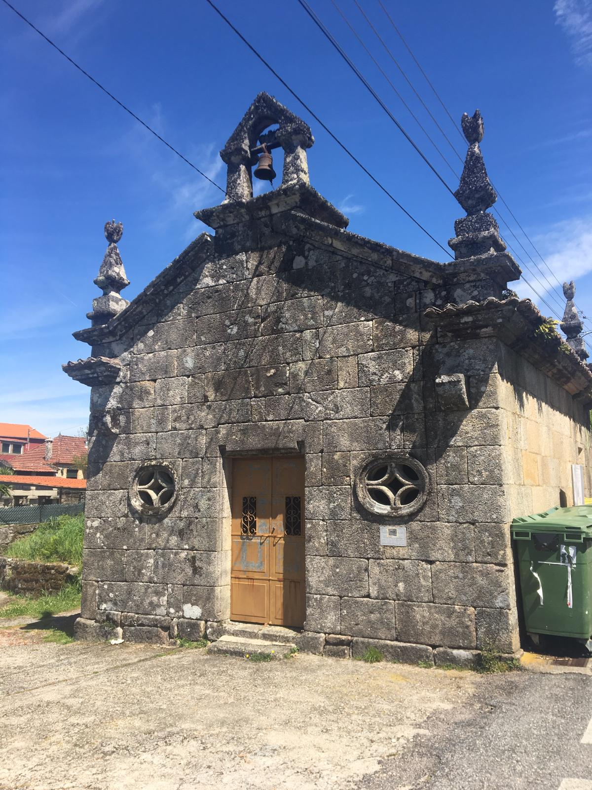 Capilla Guadalupe.